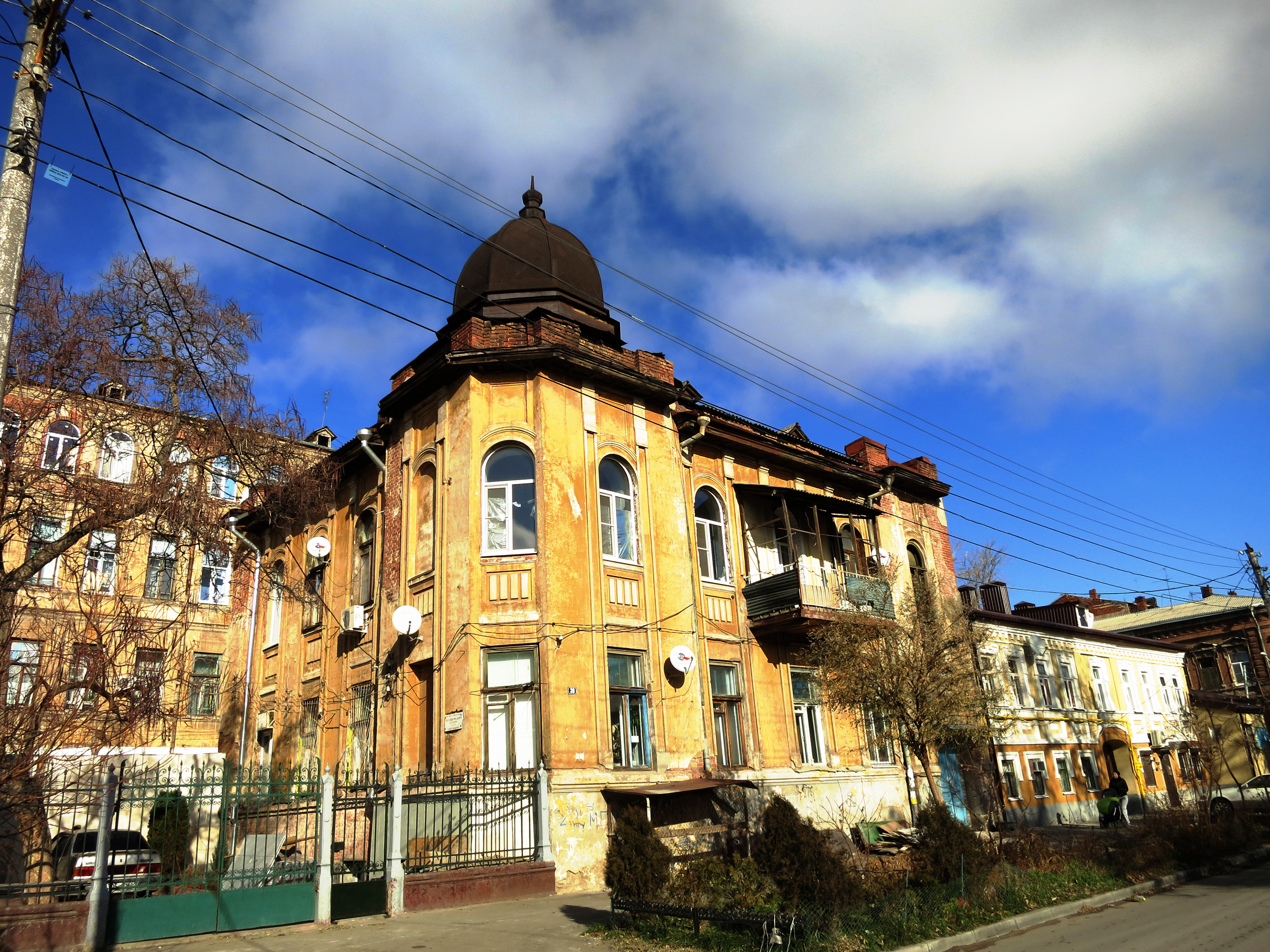 Ансамбль: улица Ульяновская, 37, Ростов-на-Дону, Ростовская область